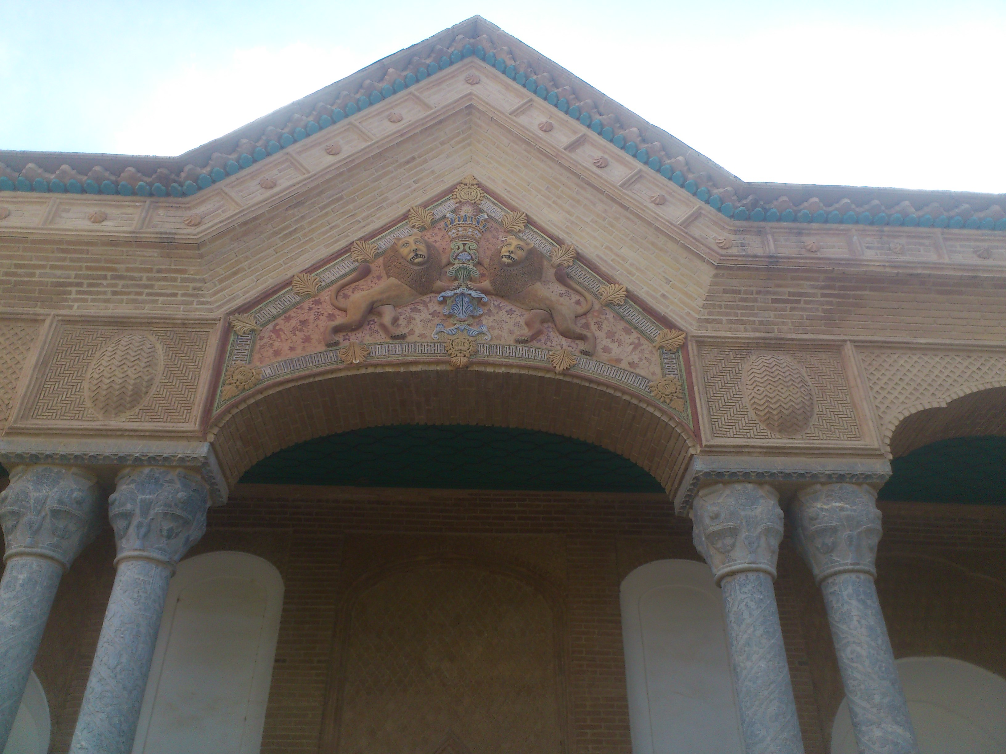 سردر ورودی